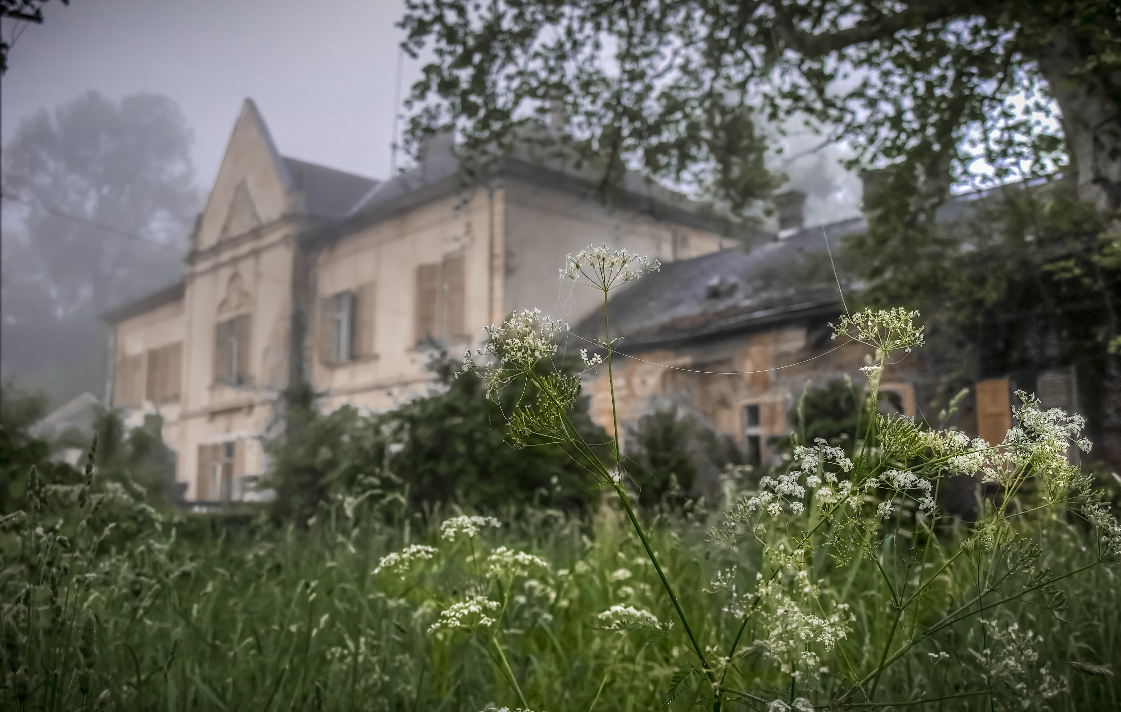 Intrarea principala a castelului, fatada vestica